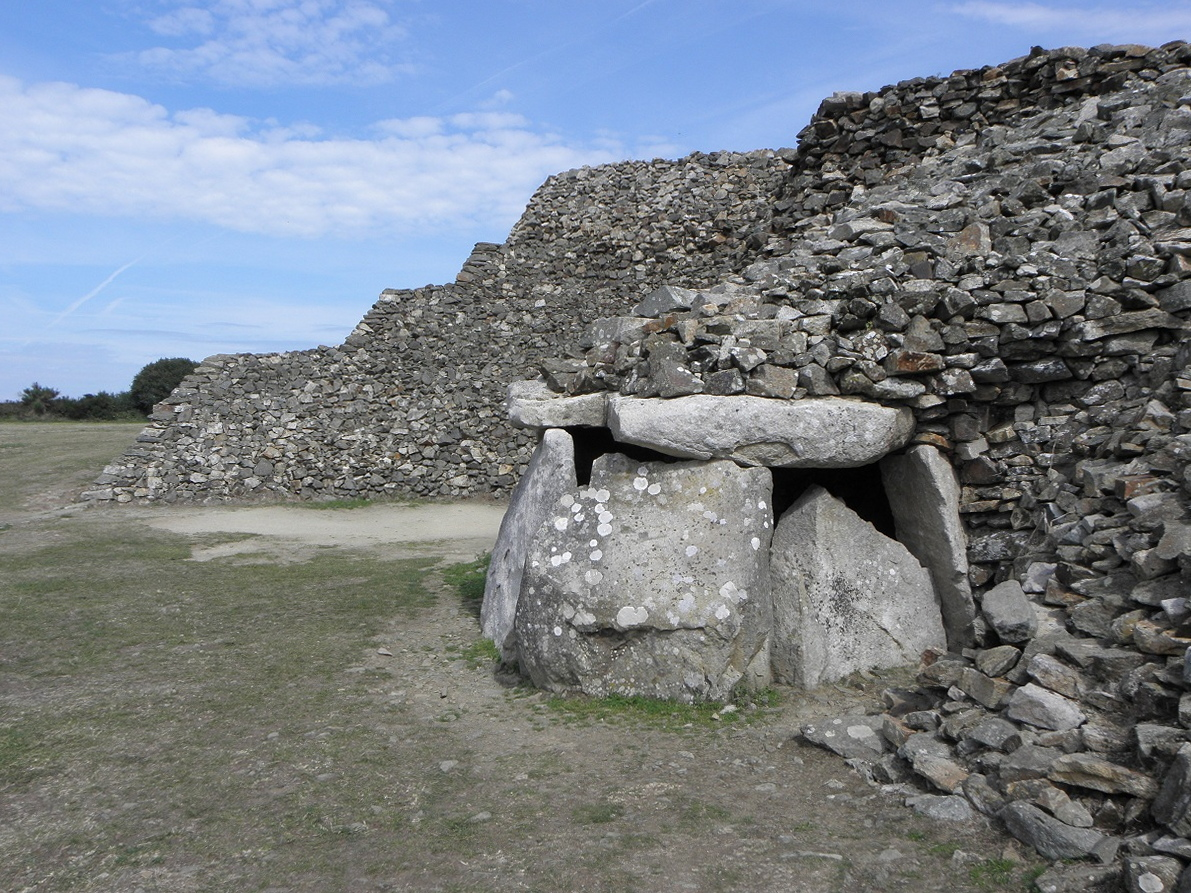 Cairn de Barnenez, commune de Plouezoc'h (29).